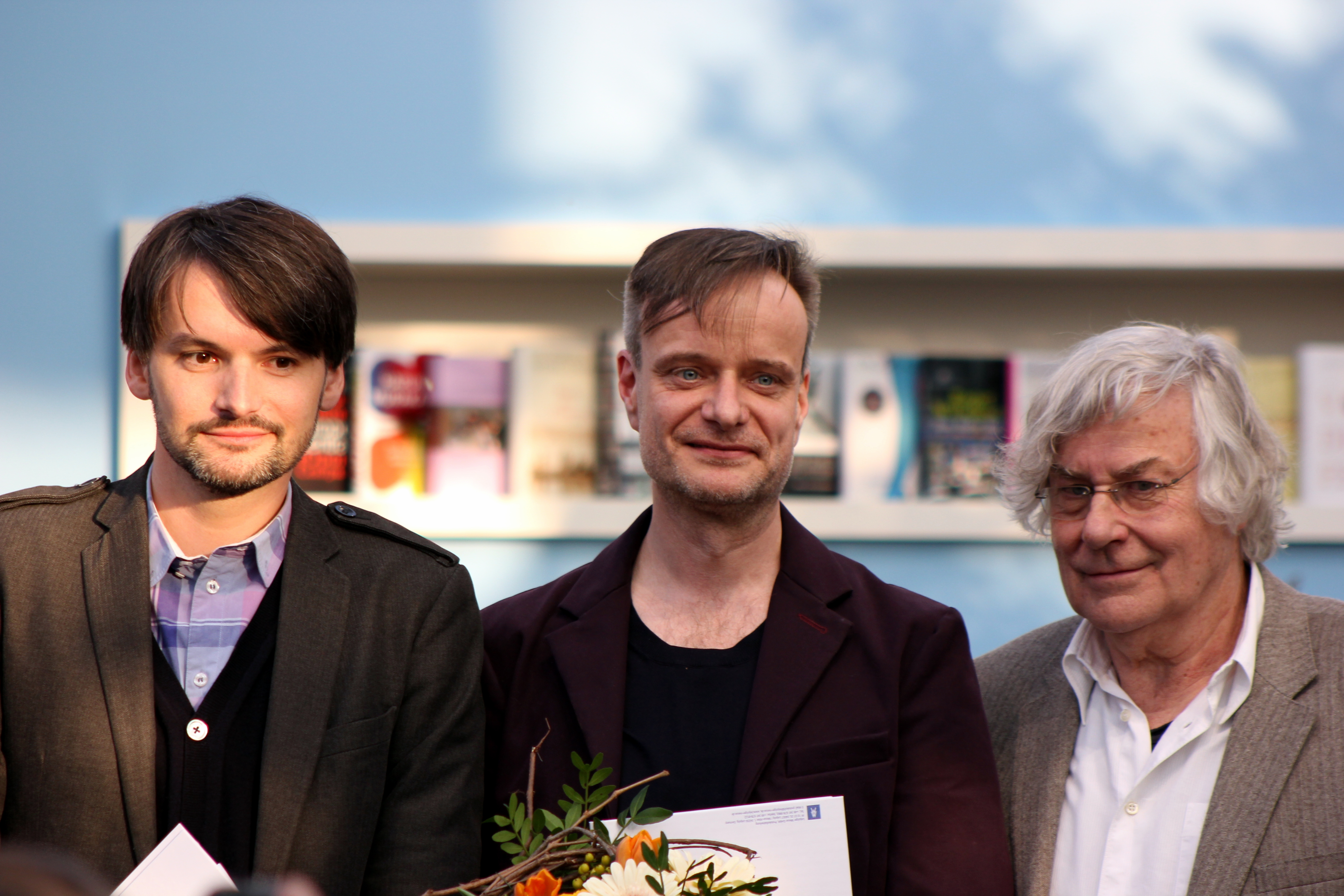 Saša Stanišić (Belletristik), Robin Detje (Übersetzung) und Helmut Lethen (Sachbuch) haben den 10. Preis der Leipziger Buchmesse erhalten.